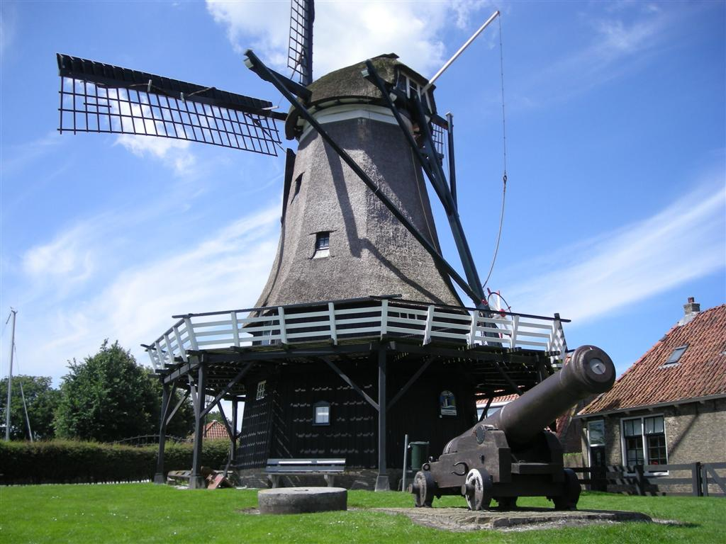 De Kaai, molen in Sloten